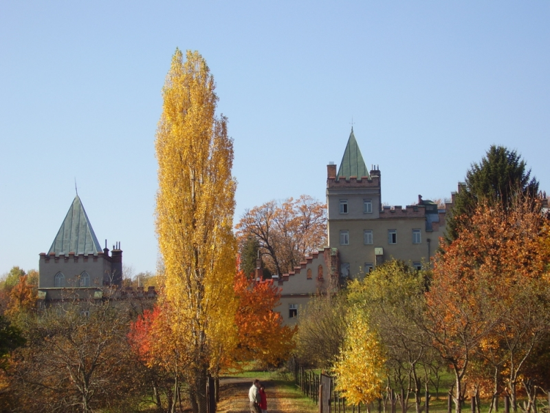 Pohled na zámek v Přemyslovicích od silnice č. 366 z Prostějova na Svitavy